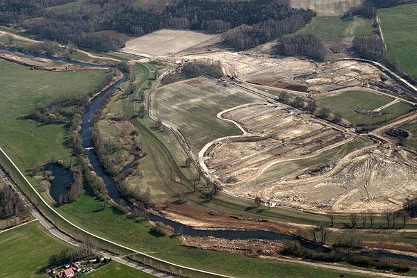 Der erste Bauabschnitt des Projektkes "Biotopverbund Spreeaue" begann 2006.